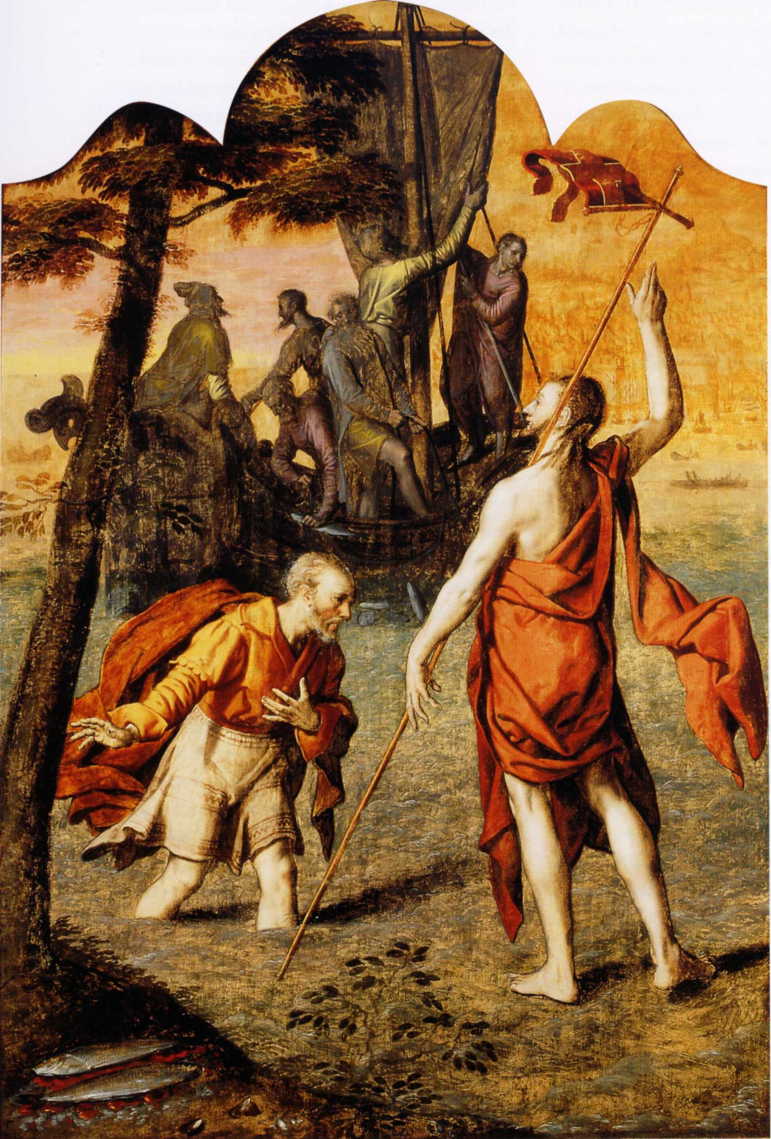 Verschijning van Jezus aan het meer van Tiberiastitle QS:P1476,nl:"Verschijning van Jezus aan het meer van Tiberias" label QS:Lnl,"Verschijning van Jezus aan het meer van Tiberias"